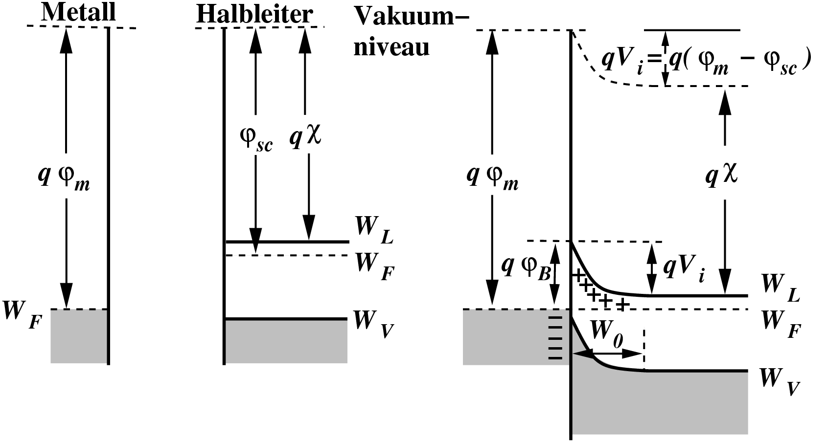 Bänderdiagramme an einem Halbleiter-Metallübergang. Links: Die beiden einzelnen Materialien. Rechts: Die Gleichgewichtssituation nach Kontaktierung - Das Band des Halbleiters verbiegt sich am Metall-Halbleiter-Übergang; Das Ferminiveau ist in einem Halbleiter, der sich im thermodynamischen Gleichgewicht befindet, konstant. Die Bandverbiegung entspricht einer eingebauten Potentialdifferenz, die Diffusionsspannung genannt wird. Durch Diffusion der Ladungsträger in der Raumladungszone entsteht diese Spannung.